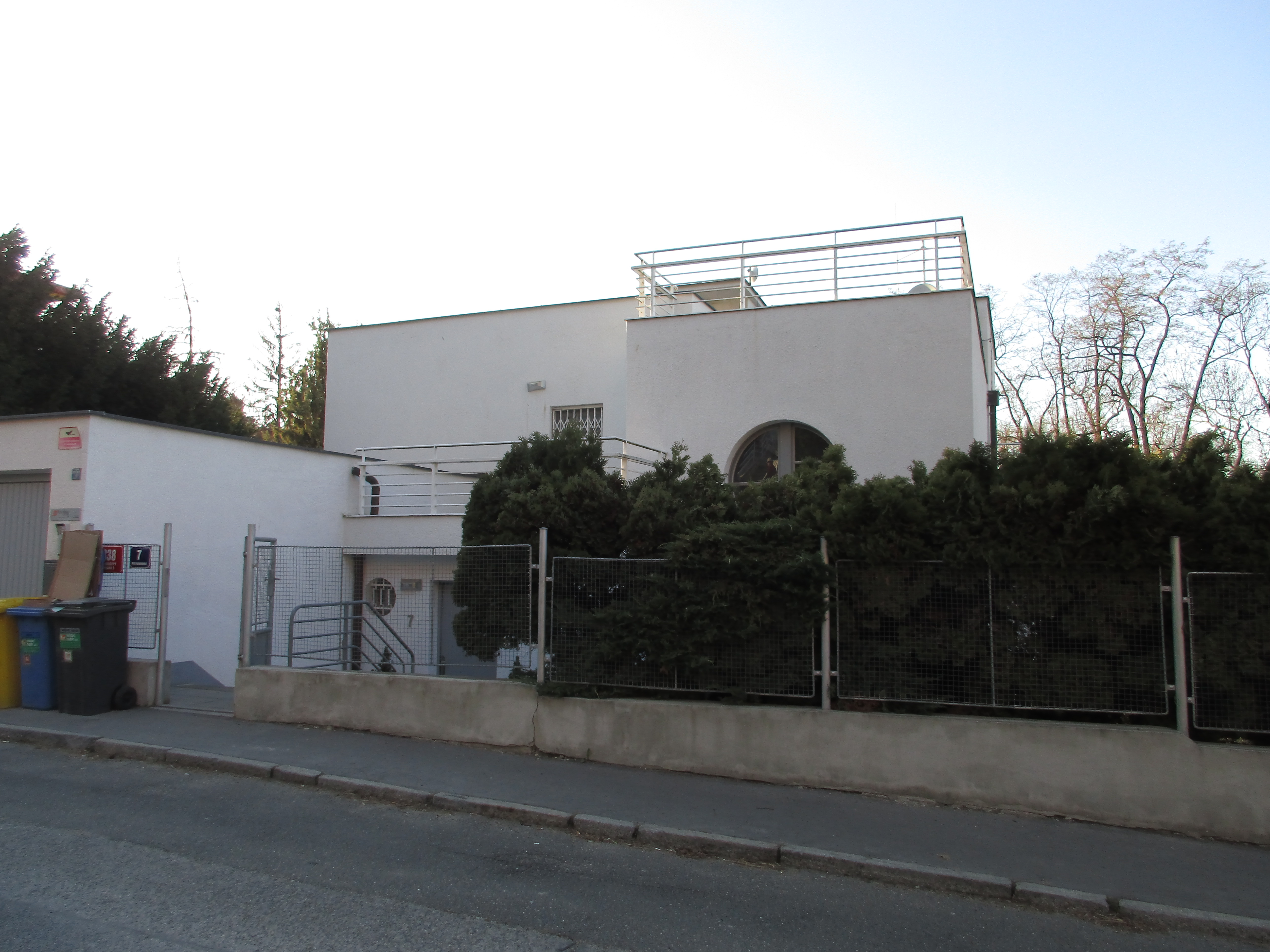 Pod Habrovou 338/7, Praha 5-Hlubočepy